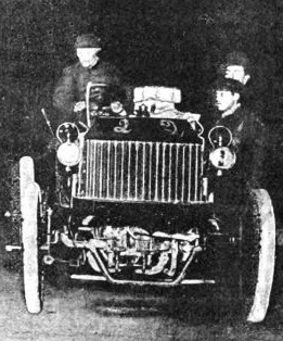 Camille Jenatzy sur Snoek-Bolide Bolide, première Coupe G. Bennett (14 juin 1900) Histoire de l'automobile, Pierre Souvestre, éd. H. Dunod et E. Pinat, 1907 (ASIN B001BPBE58) p.478